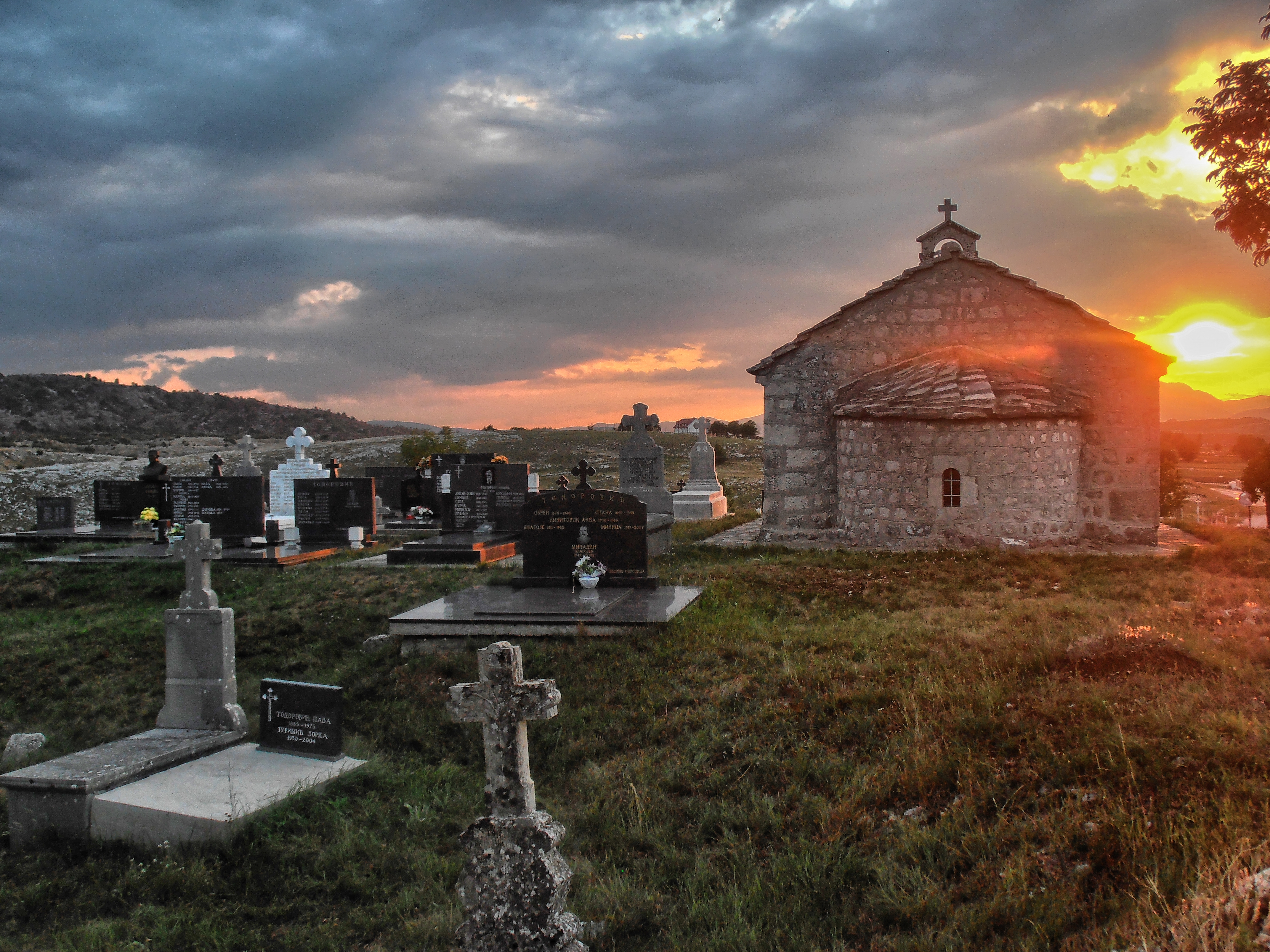 NKD300 Храм Светог Николе у селу Добреља. Не зна се година кад је саграђен, из ранијег је периода. Постоји податак о обнови из 1884/9. 2001. године је обновљен и освећен